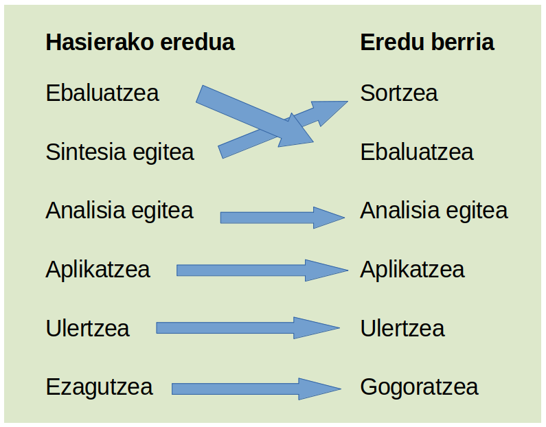 Bloom-en taxonomia. Hasierako eredua eta 2001. urtekoa.